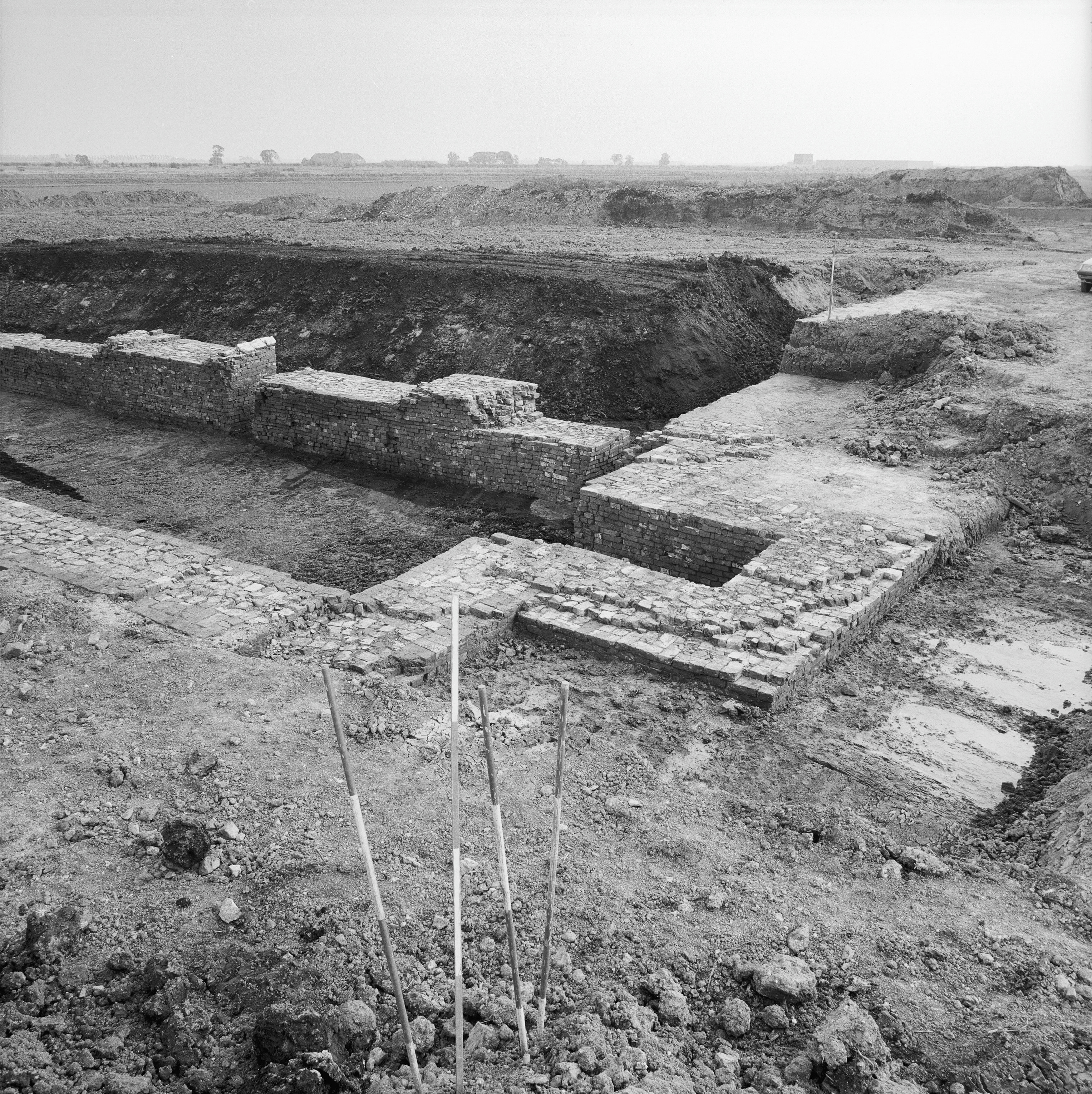 VOORMALIG KLOOSTERKERK: Exterieur FUNDERINGEN, NOORDWEST HOEK